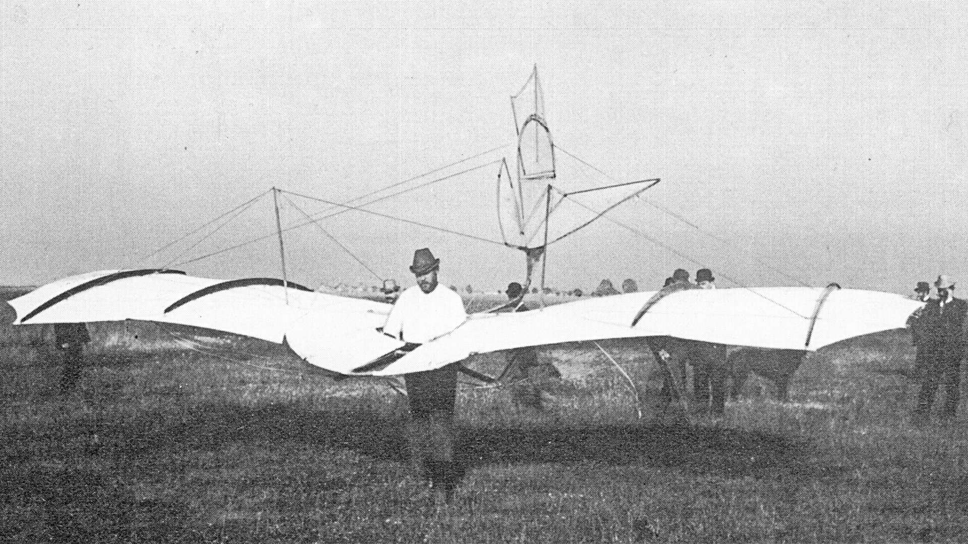 Otto Lilienthal mit seinem Normalsegelapparat. Deutlich zu erkennen sind die vier aufgeschobenen Profilschienen.